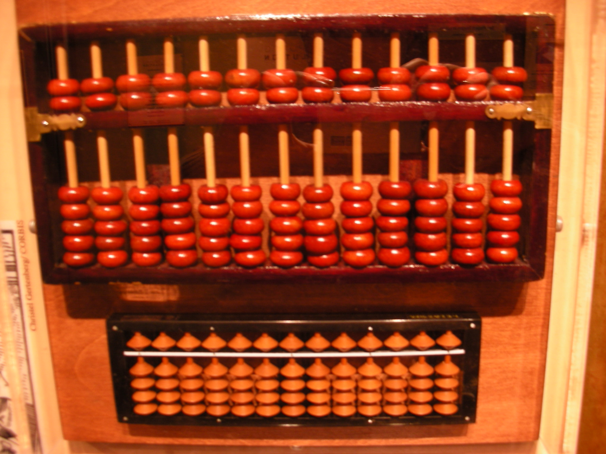 Abacus